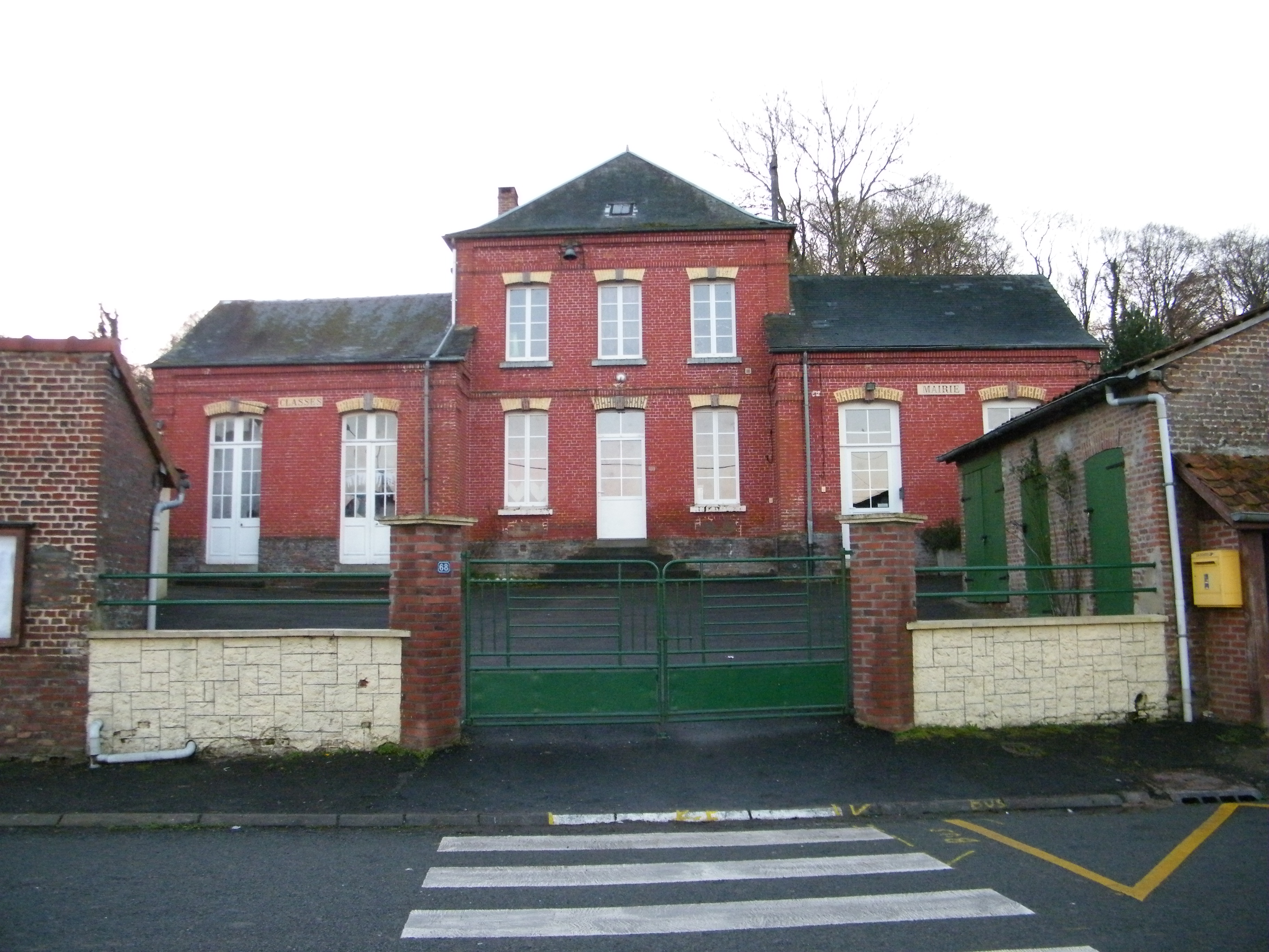 Commune : mairie-école.